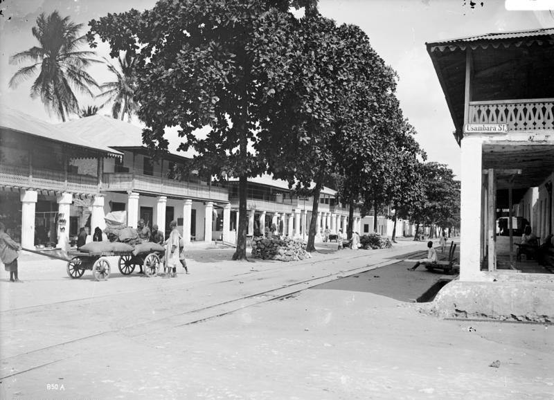 Tanga, Marktstr.